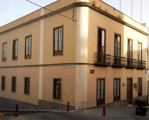 Sede de la Fundación Canaria Orotava de Historia de la Ciencia. La Orotava, Tenerife.